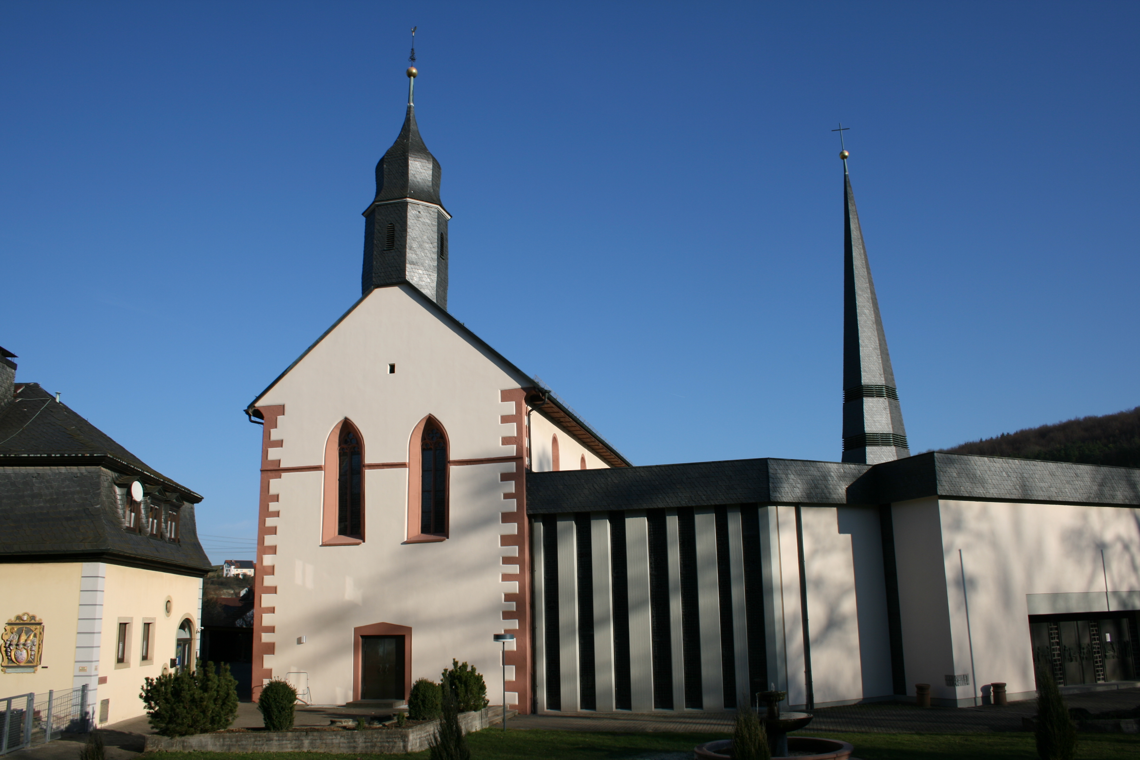 Pfarrkirche St. Michael, Außenansicht